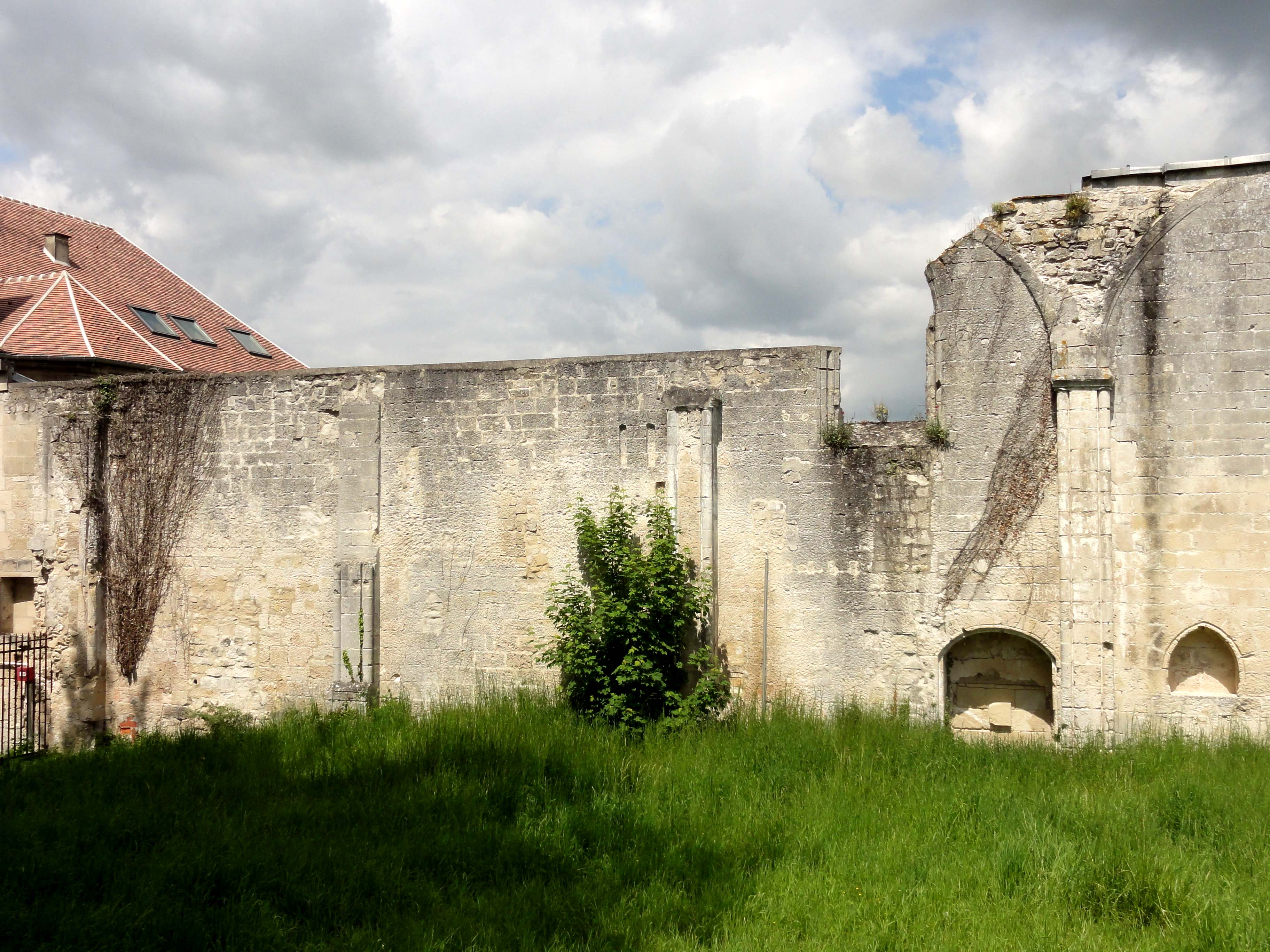 Prieuré Saint-Arnoul de Crépy-en-Valois - voir titre.